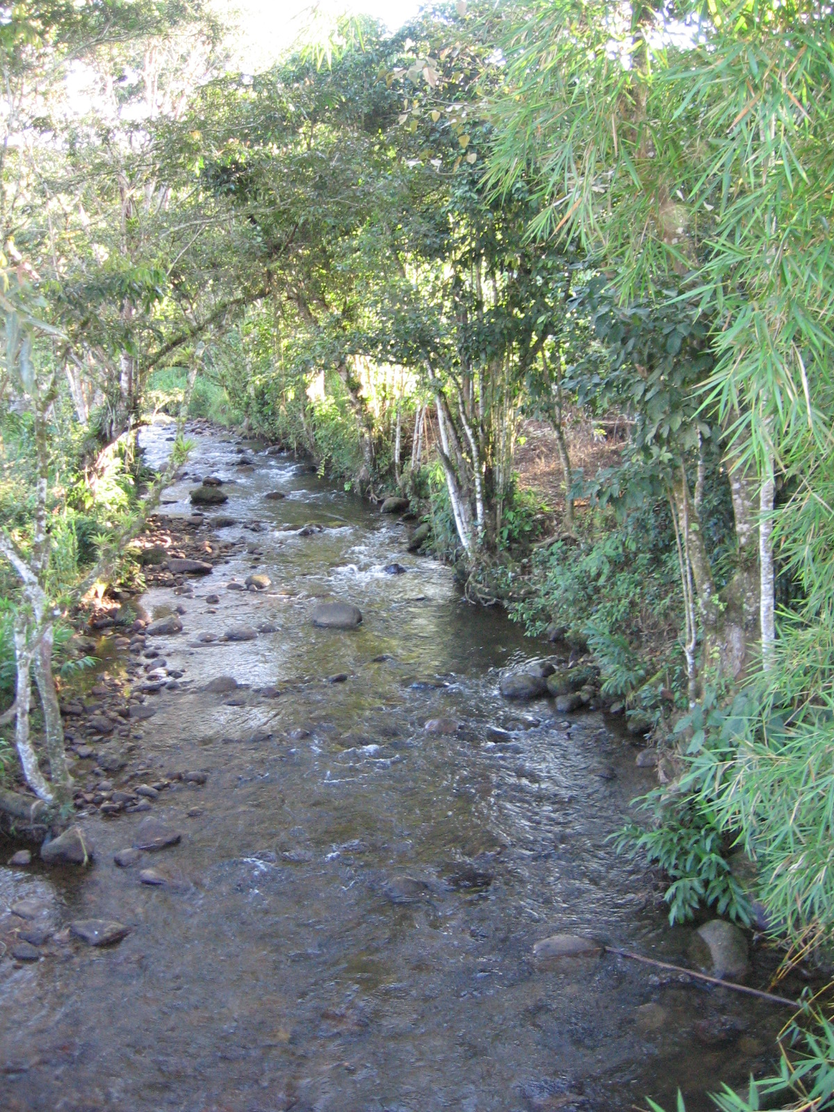 Paso de la quebrada de Agua Blanca al lado de Berbeo